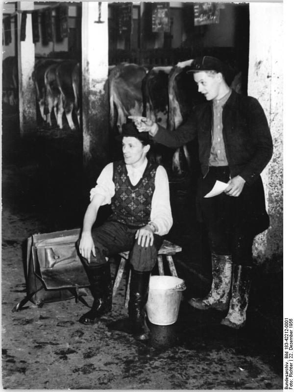 Frauenprießnitz, Bauern im Kuhstall Zentralbild -Richter Rie-Ho 22.12.1956 Junge Zootechniker bewähren sich. Im Juni 1956 legten 58 Zootechniker und Agronomen ihr Staatsexamen an der Fachschule für Landwirtschaft in Triptis-Thür.ab und nahmen ihre Tätigkeit in den MTS, LPG und VEG auf.Einer dieser jungen Zootechniker ist der 22-jährige Heinrich Schmidt, der seit dem 15.7.1956 in der LPG Frauenprießnitz, Bez.Gera, arbeitet.Er betreut in der LPG 230 Rinder, 520 Schweine 250 Schafe und einige 100 Stück Gefügel.Zu seinem Aufgabenbereich gehört u.a.das Führen des Zuchtbuches, laufende Milchprüfungen, ferner hat er einen wesentlichen Einfluss bei der Aufstellung des Futterplanes und des Produktionsplanes und des Produktionsplanes für Gross-und Kleinvieh. UBz: Zootechniker Heinrich Schmidt(rechts) und Besamungstechniker Egon Hofmeister wählen sich die Kühe aus, die für die Besamung vogesehen sind.